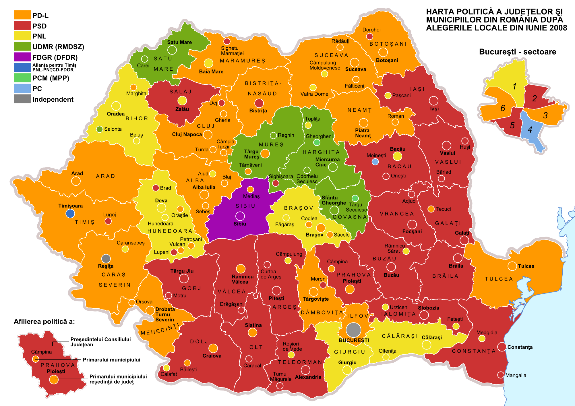 Harta politica a judetelor si municipiilor din Romania dupa alegerile locale din iunie 2008.